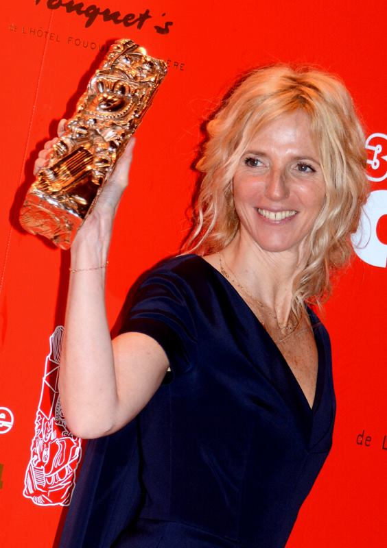 Sandrine Kiberlain à la cérémonie des César